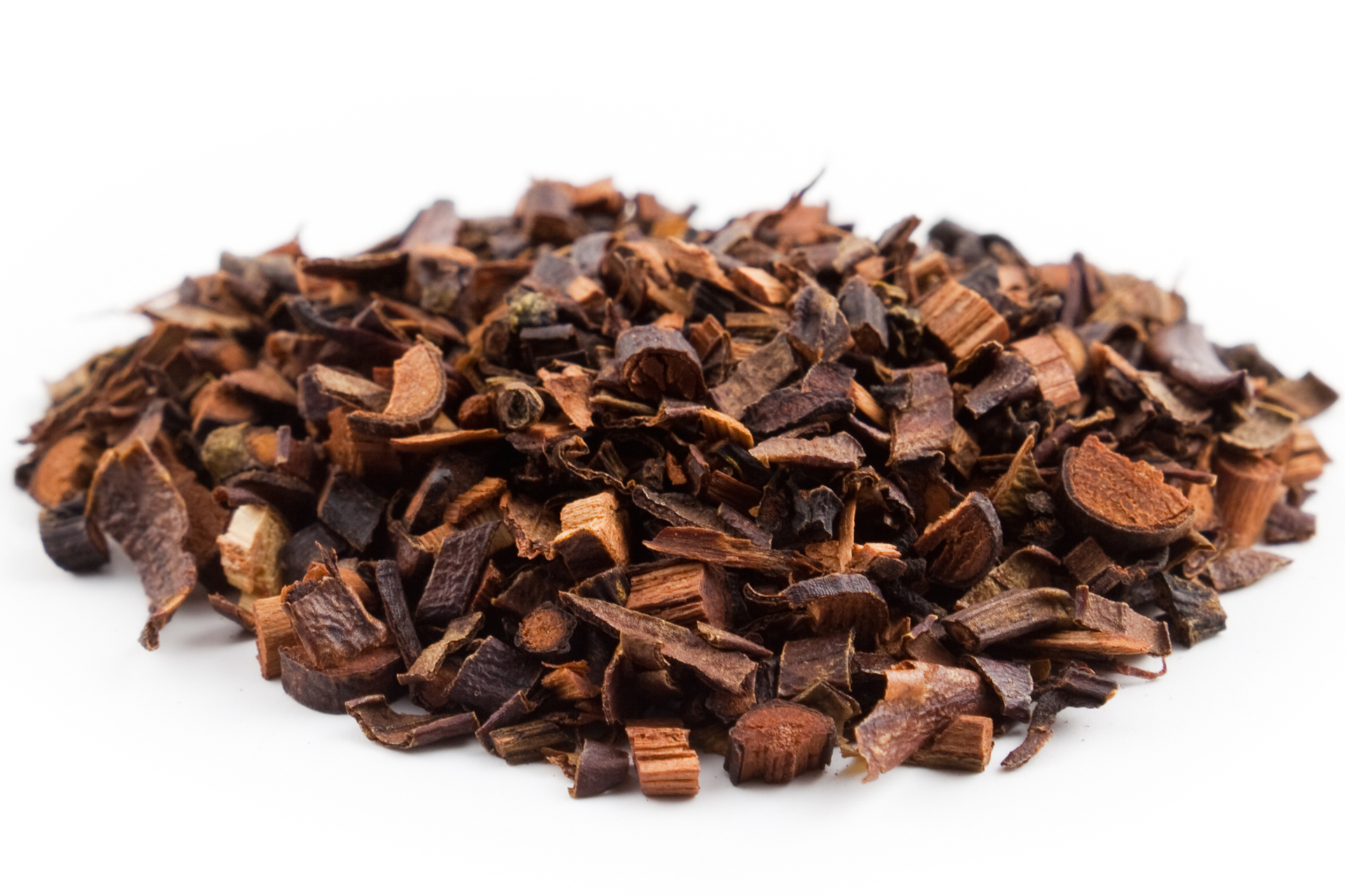 Honigbusch (Honeybush) geschnitten und getrocknet